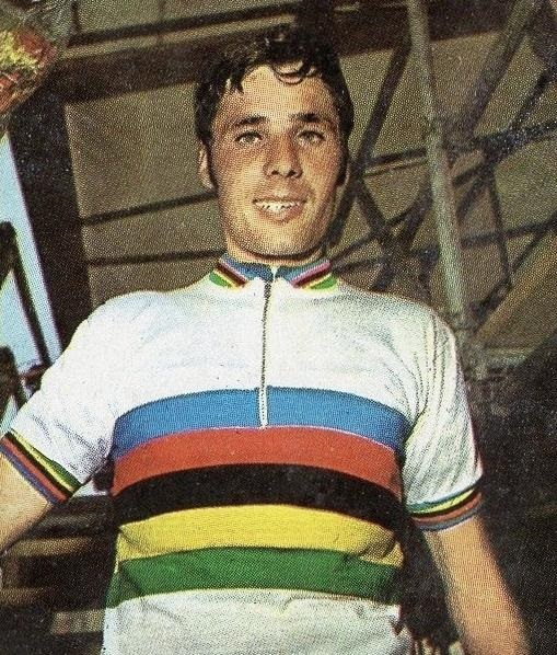 Régis Ovion 3 - 1972 (Olympic Games, Munchen)